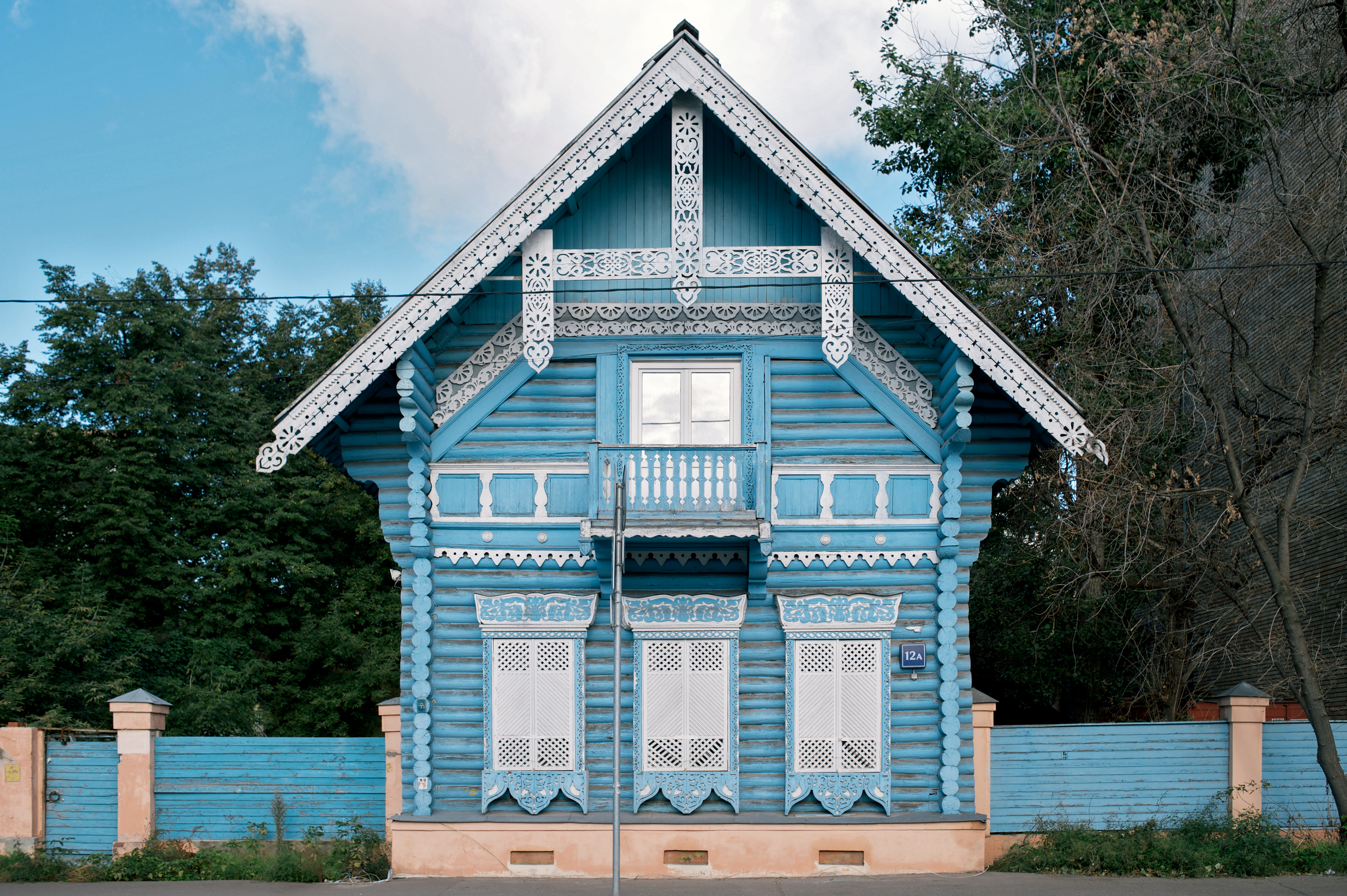 Дом, в котором жил профессор Московского университета, историк, издатель, коллекционер Погодин Михаил Петрович. Здесь у него бывали М.Ю.Лермонтов, А.Н.Островский, И.С.Тургенев, С.Т.Аксаков, Л.Н.Толстой, А.А.Фет и другие. В 40-х гг. XIX в. здесь жил Н.В.Гоголь: Погодинская ул., дом 12А, Хамовники, Центральный округ, Москва